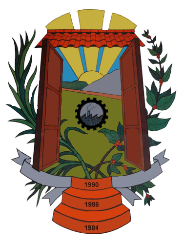 Escudo del municipio Santos Michelena, estado Aragua, Venezuela